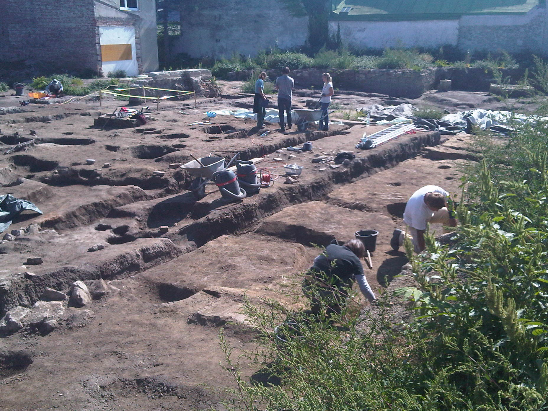 Grabung von Ala Nova